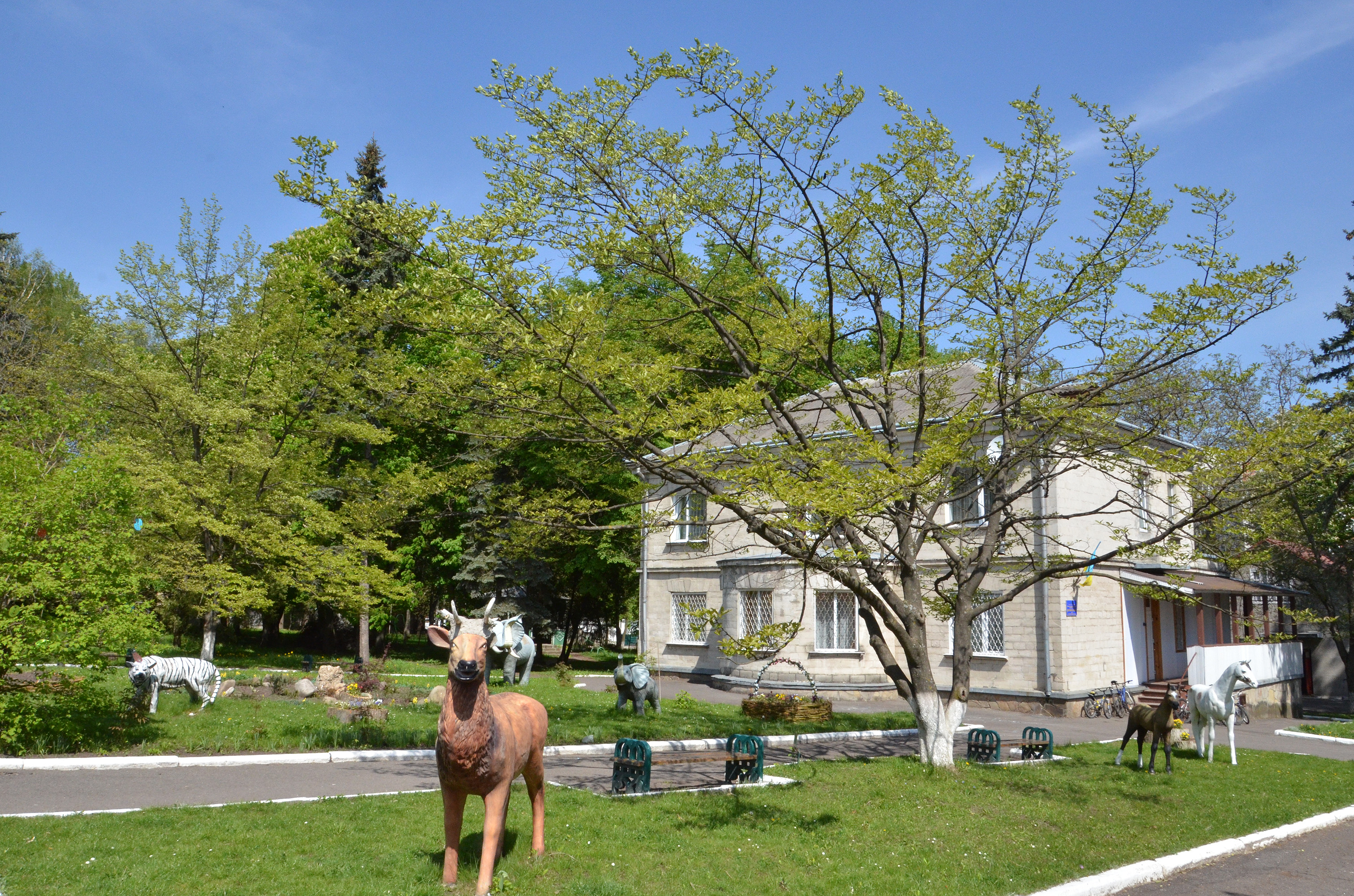 Ботанічна пам'ятка природи «Тернопільські магнолії» на території Тернопільського обласного комунального дитячого будинку для дітей шкільного віку на проспекті Степана Бандери, 81 у м. Тернополі.